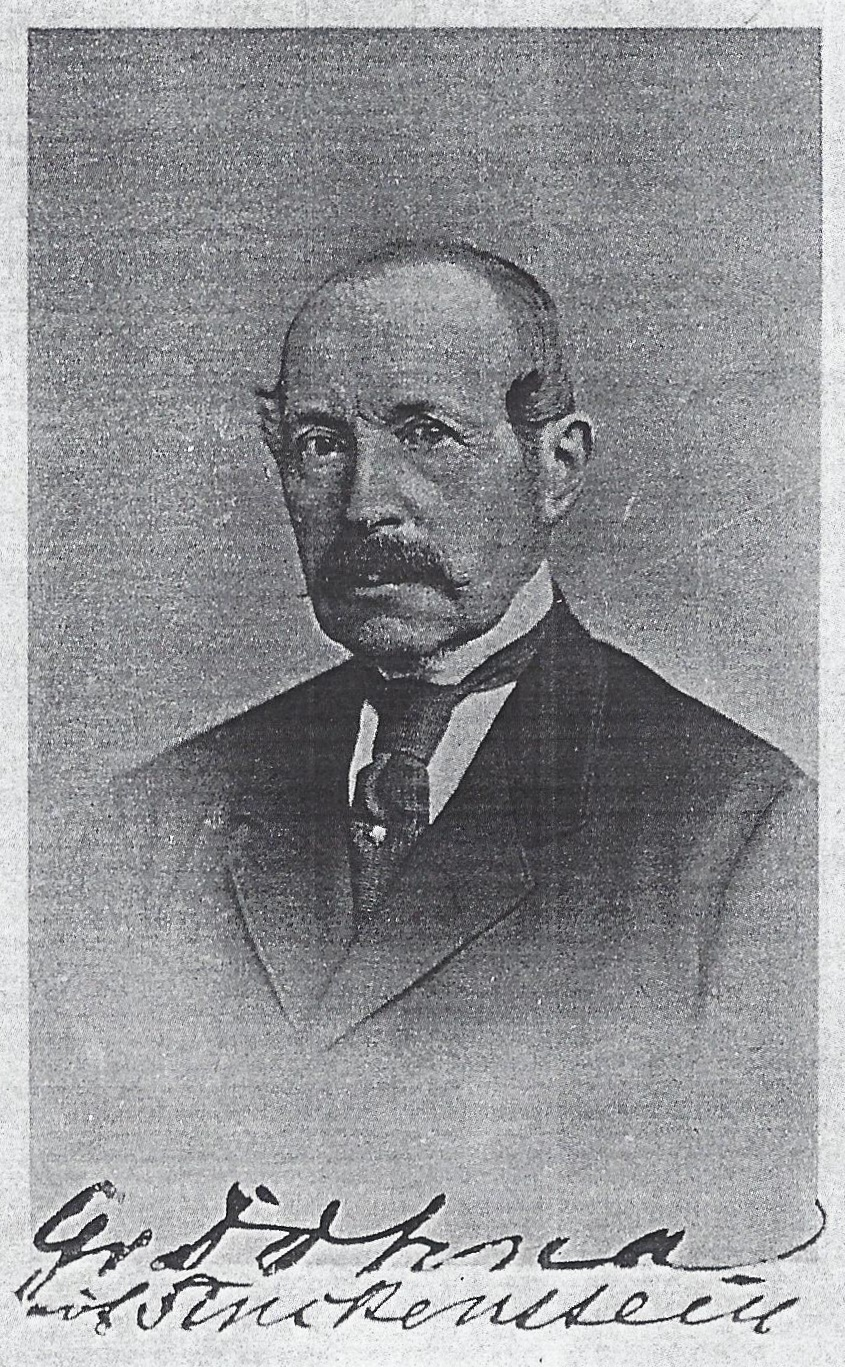 Signierte Porträtfotografie des Grafen Rodrigo zu Dohna-Finckenstein (1815-1900)